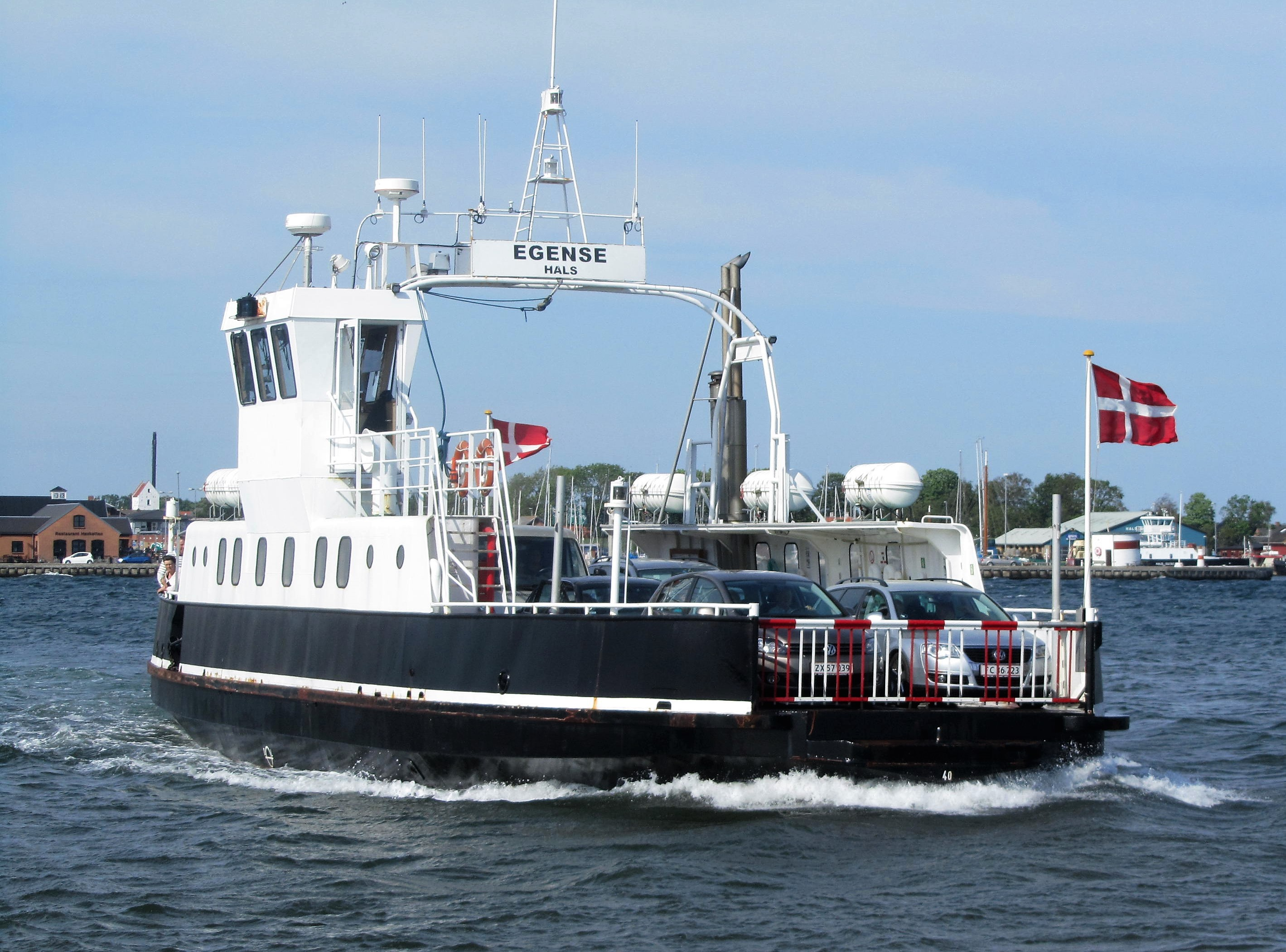 M/F Egense på vej til Hals fra Egense